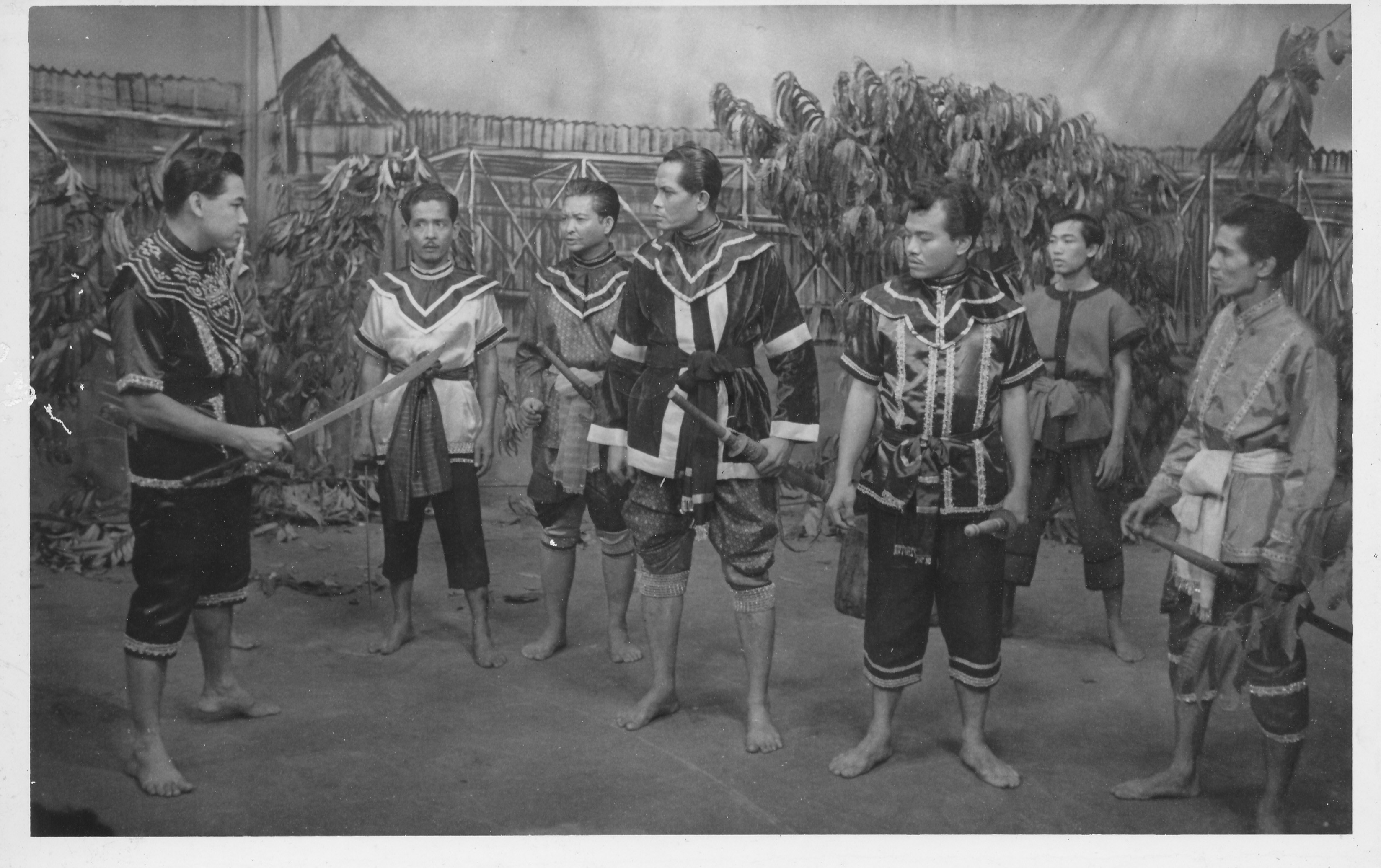 ละครโทรทัศน์เรื่องขุนศึก สถานีไทยโทรทัศน์ช่อง ๔ บางขุนพรหม จากซ้ายไปขวา กำธร สุวรรณปิยะศิริ - จำรูญ หนวดจิ๋ม - ไม่ทราบชื่อ - ทัต เอกทัต (ประวัติ ผิวเผือก)- สมจินต์ ธรรมทัต - ไม่ทราบชื่อ - เสริมพันธ์ สุทธิเนตร